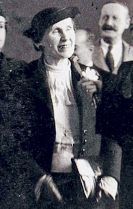 Hipatia Cárdenas, detalle de fotografía junto al general Alberto Enríquez Gallo.